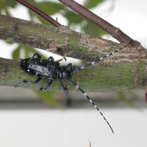 Nieuwsbericht rijksoverheid.nl 25-08-2010 Afgelopen week zijn in een daktuin in Krimpen aan den IJssel en in een tuin in Maasland sporen van een Oost-Aziatische boktor gevonden. Deze boktor komt oorspronkelijk uit het verre oosten en is zeer schadelijk voor veel loofbomen en struiken. Daarom worden op basis van Europese regels maatregelen genomen om verdere verspreiding tegen te gaan.